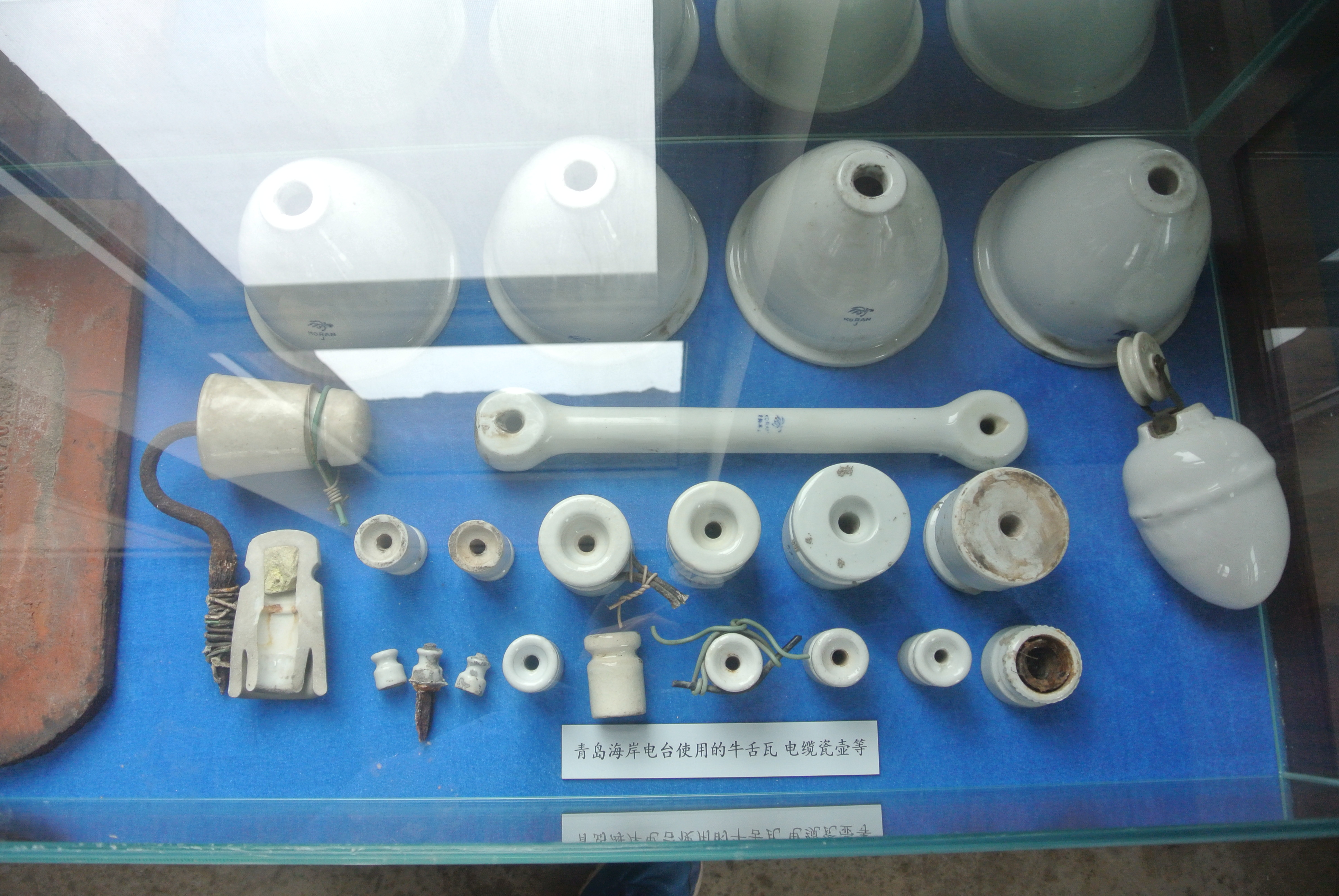 青岛航海展览馆所藏青岛海岸电台电缆瓷壶与牛舌瓦